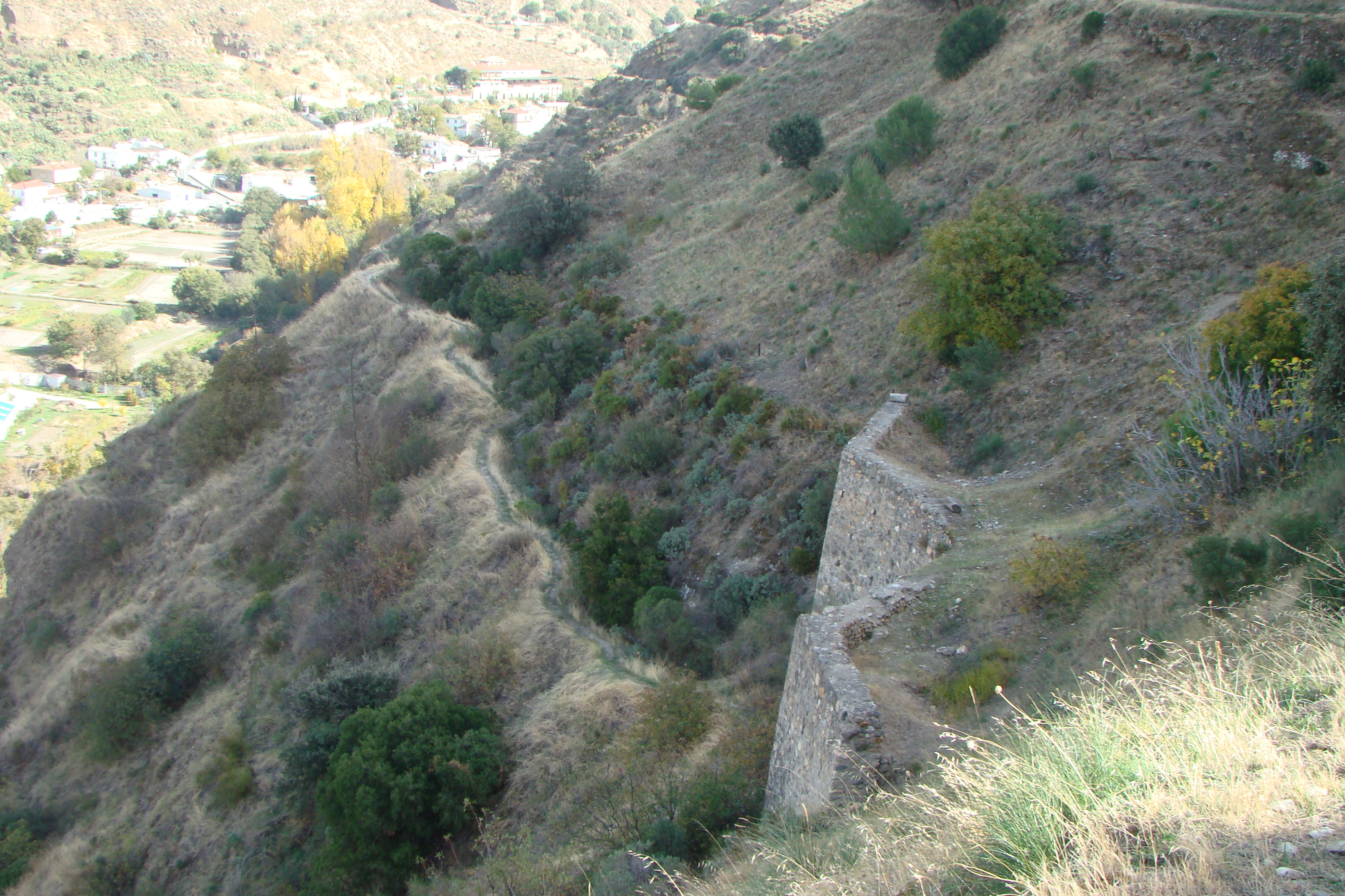 Vista del trazado antiguo de la Acequia Real de la Alhambra